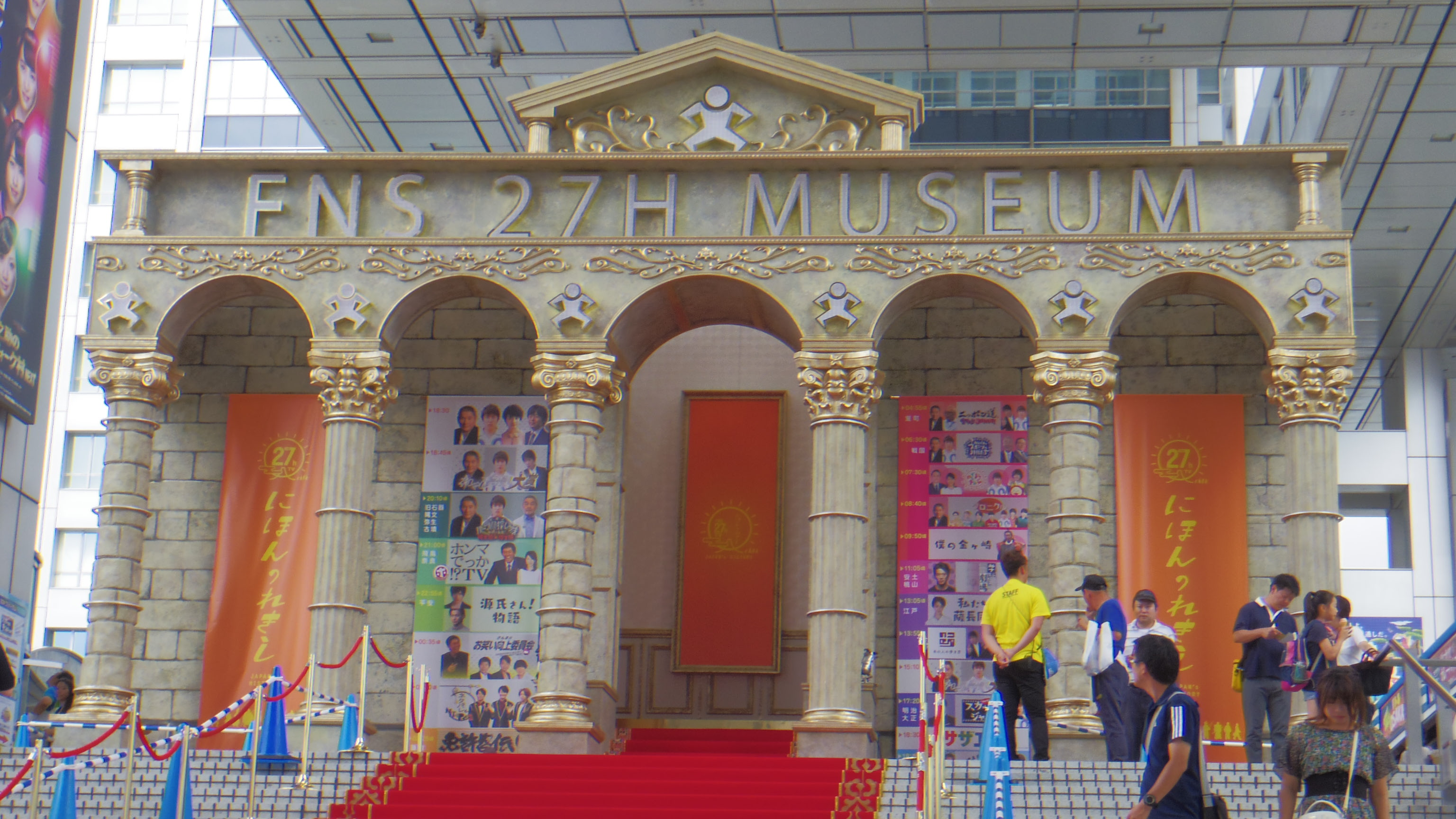 「FNS27時間テレビ にほんのれきし」放送（2017年9月9日・10日）を記念して作られたミュージアムセット。当日の番組内でも使用された。2017年8月27日、東京・台場のフジテレビ本社屋「お台場みんなの夢大陸」大階段にて撮影。